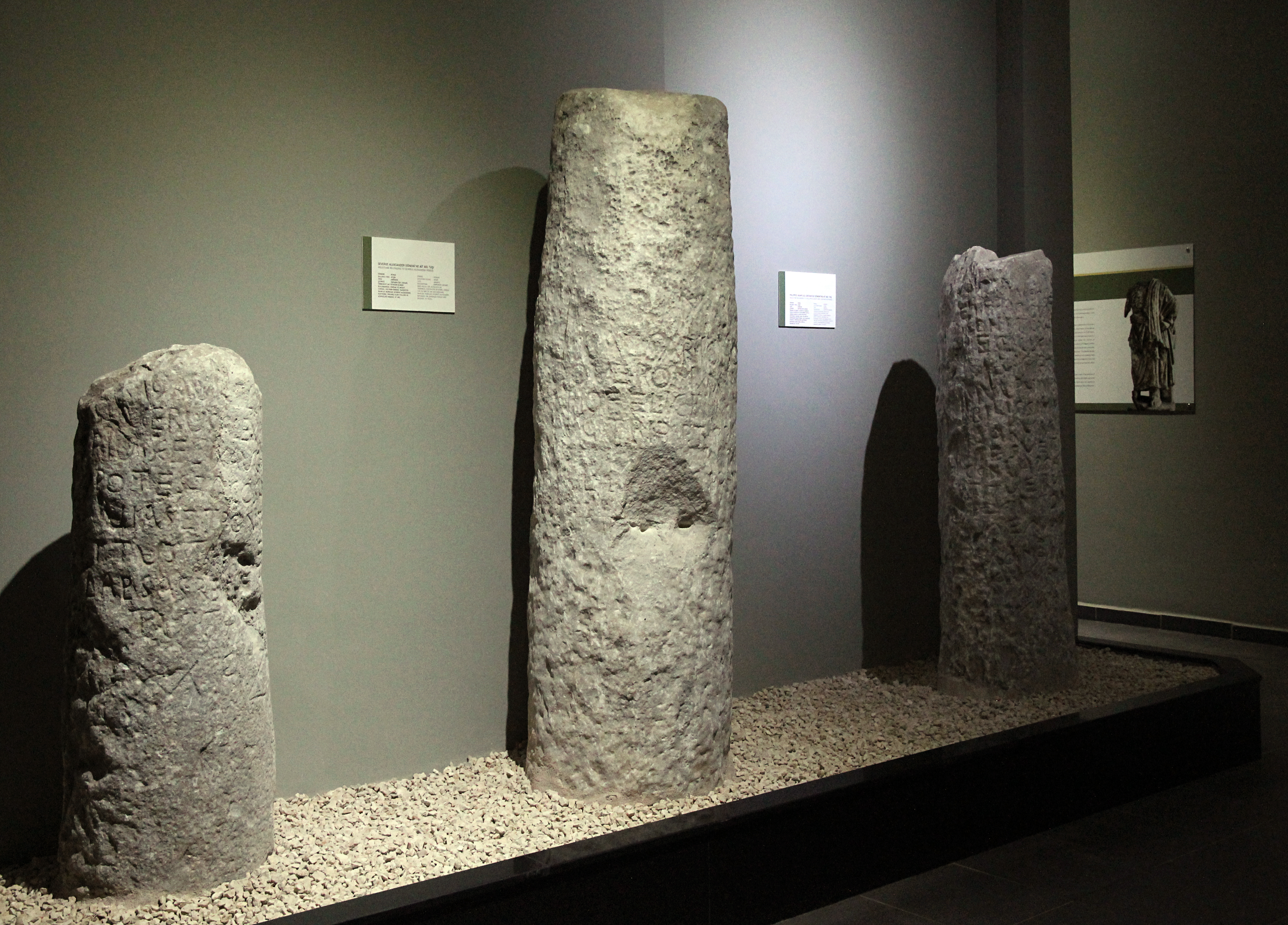 Archäologisches Museum Kahramanmaraş, Türkei, römische Meilensteine